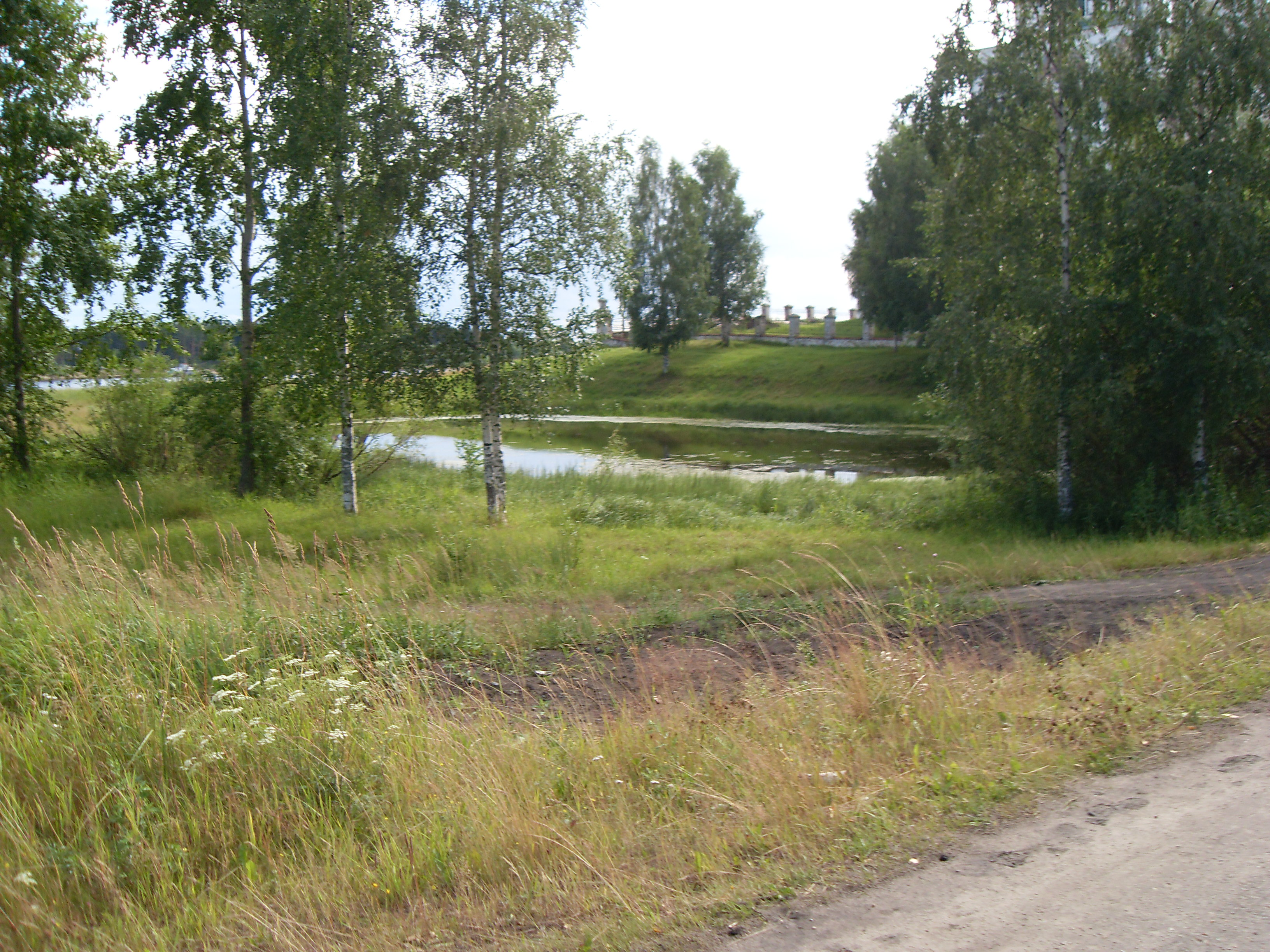 Жемчужное озеро г. Сольвычегодск